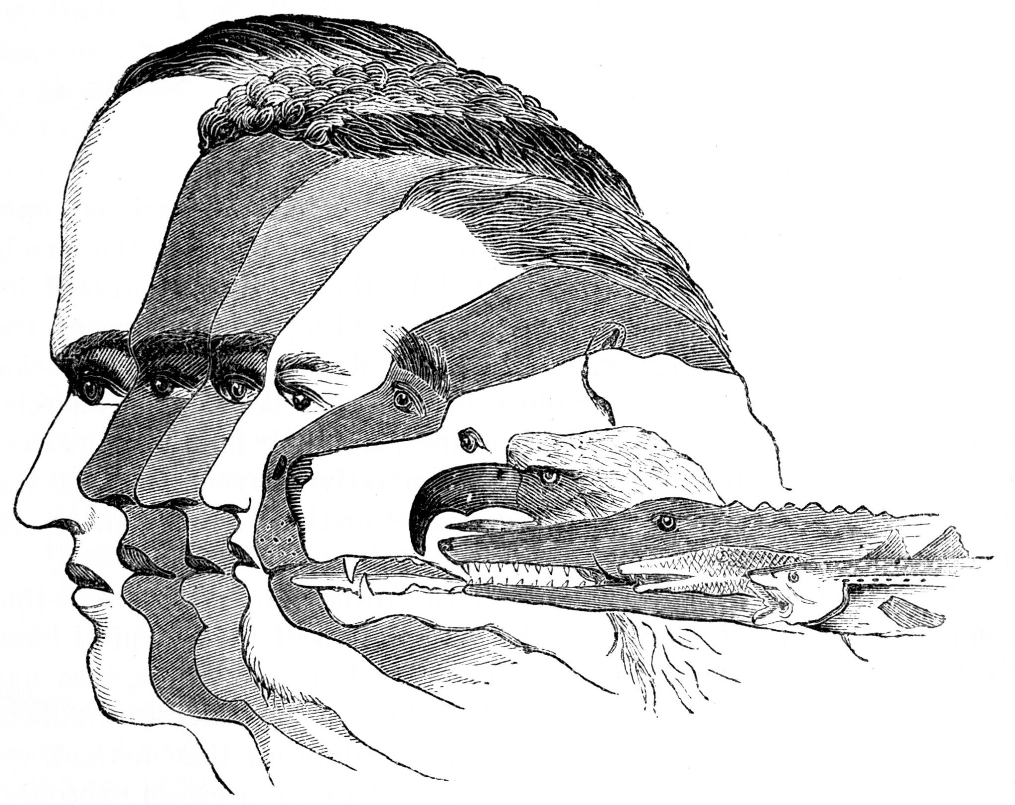 Cranial profiles